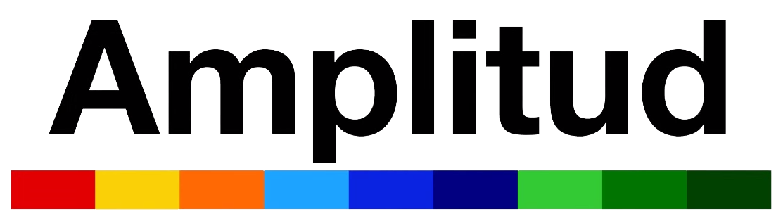 Emblema del movimiento político chileno Amplitud.